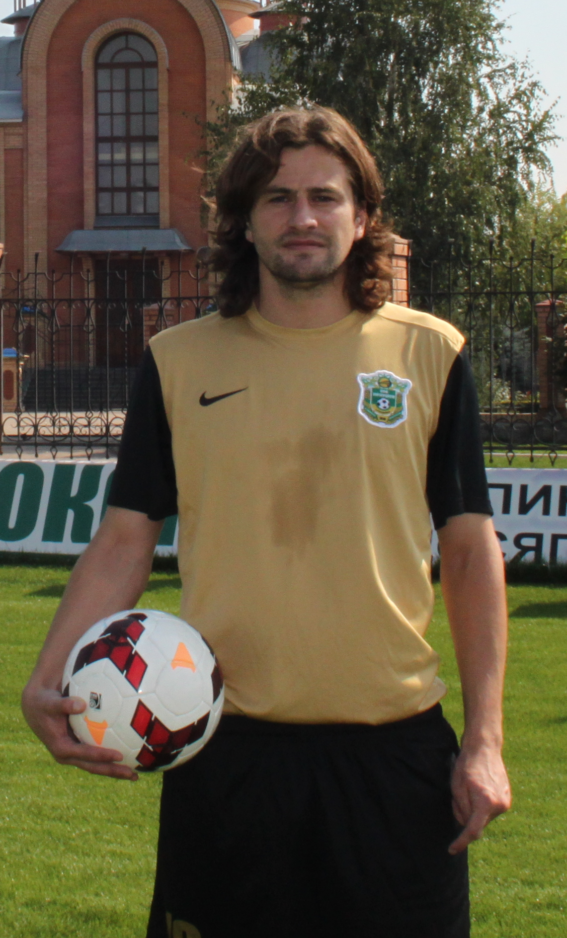 Дмитро Бровкін